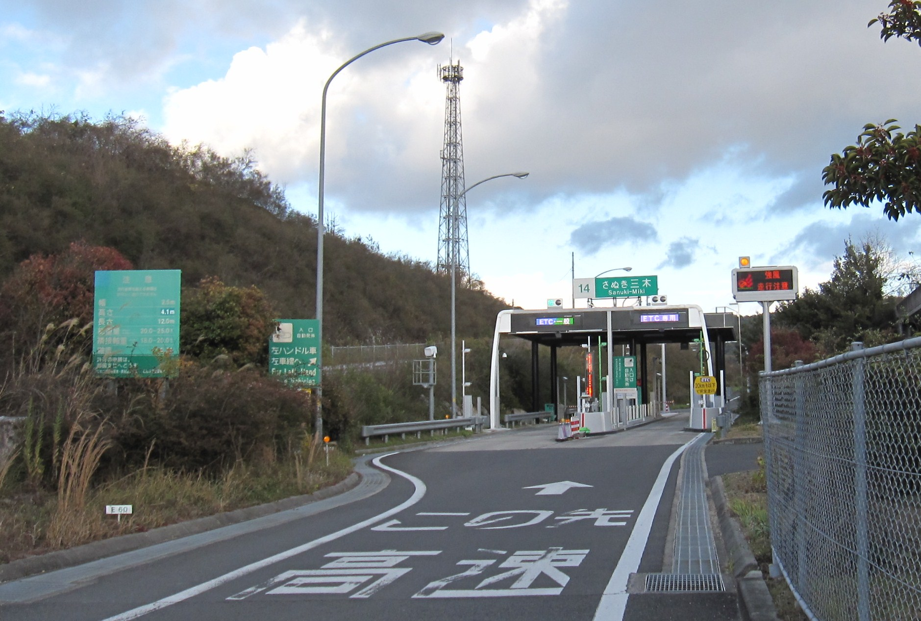 さぬき三木インターチェンジ入口